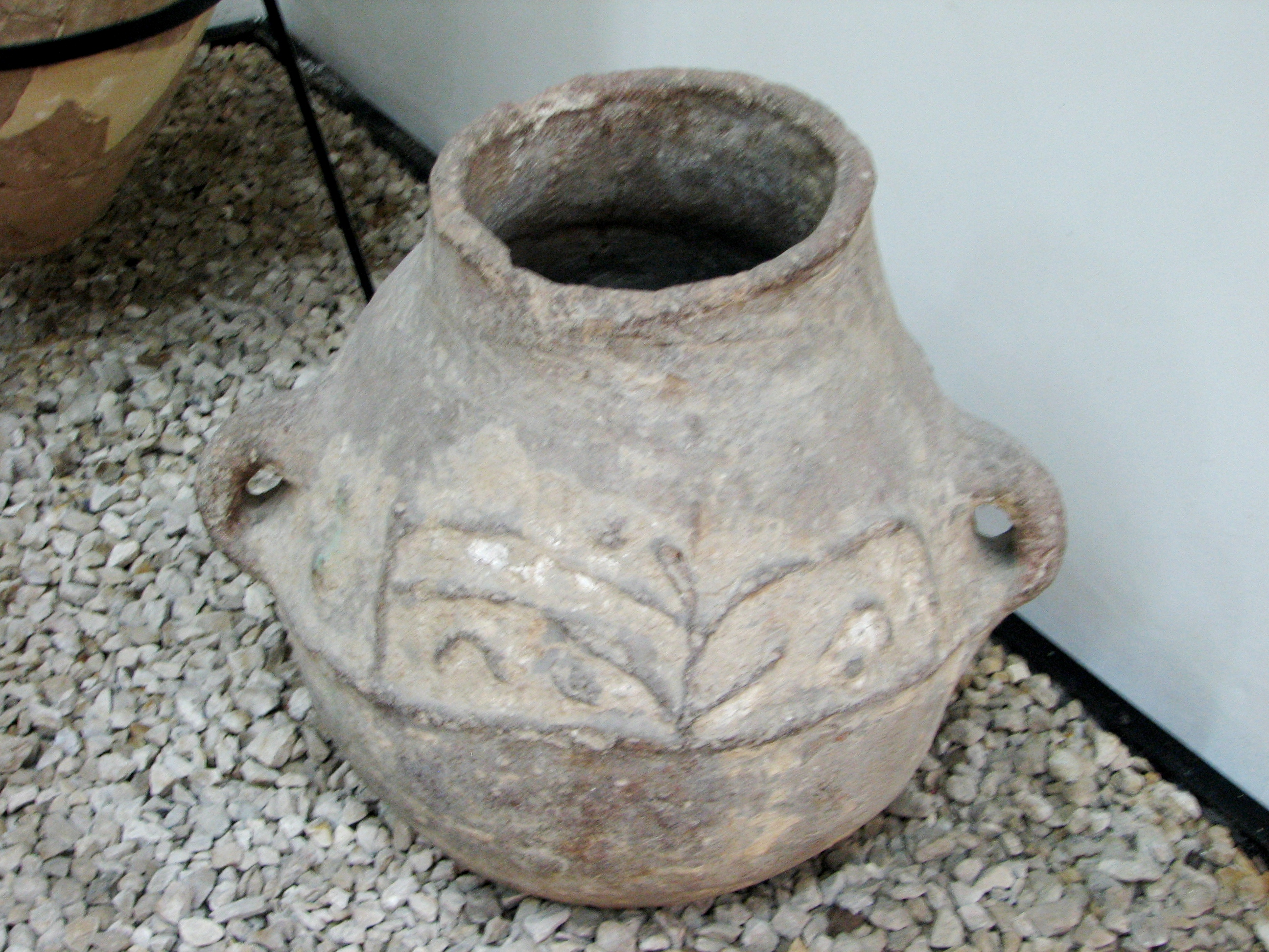 Dagon Museum, Downtown, Haifa, Israel The Museum is dedicated to the history of grain products מוזיאון דגון בעיר התחתית בחיפה שוכן במבנה המשרדים של ממגורות דגון. המוזיאון מוקדש לתולדות הדגן ומוצריו, וכלל ממצאים ארכאולוגים הקשורים בנושא וכן דגמים של מתקנים שונים בהם משתמשים בממגורות דגון קנקן לאגירת תבואה מתל חצור. תקופת הברונזה המאוחרת ג' 1300 עד 1200 לפני הספירה